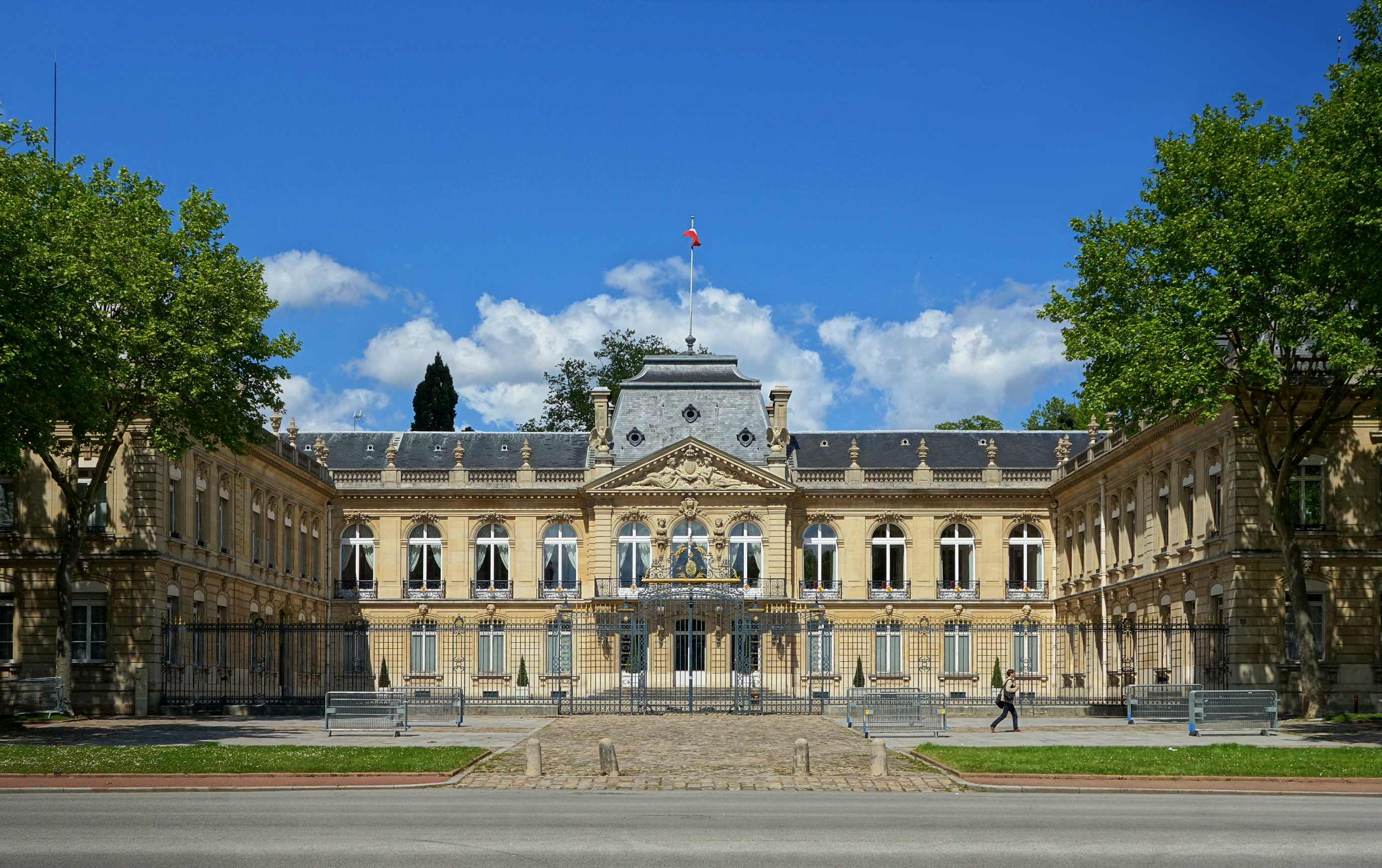 L'entrée de la préfecture des Yvelines à Versailles.